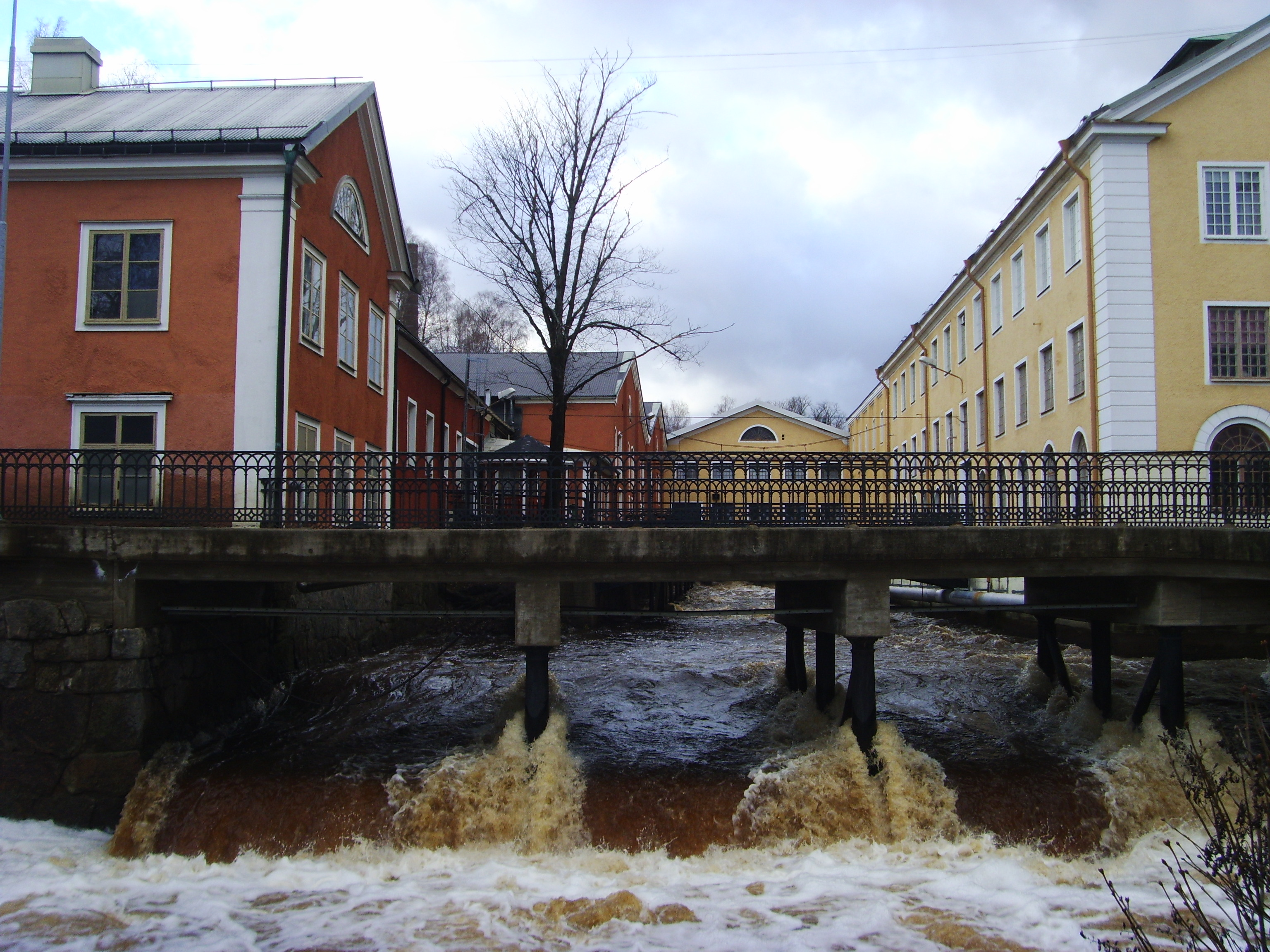 Bruksmiljön i Finspång